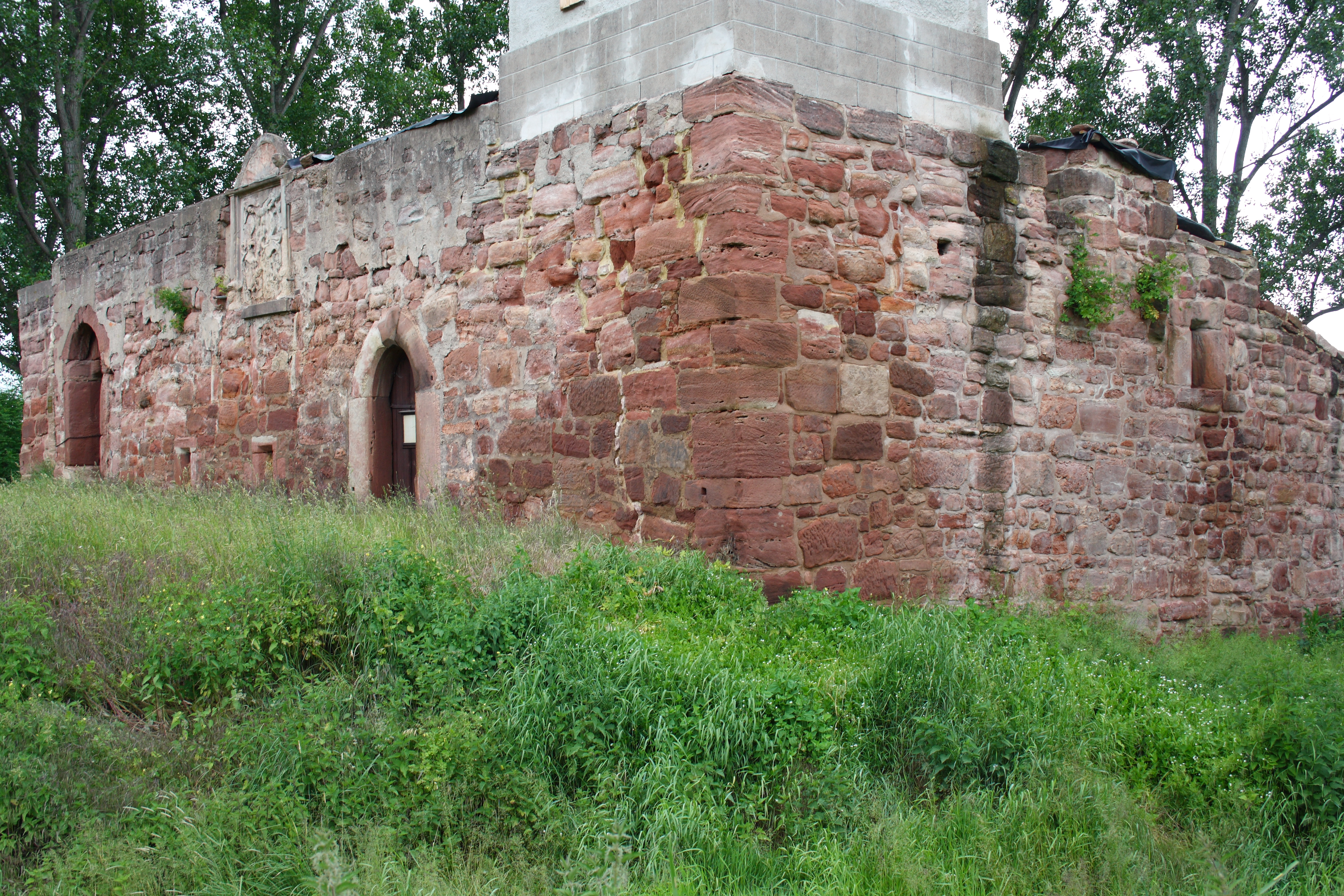 Wasserburg Aue in Aue, einem Ortsteil von Wanfried im Werra-Meißner-Kreis (Hessen), Stammsitz der Herren von Aue, nach 1435 im Besitz der Herren von Eschwege